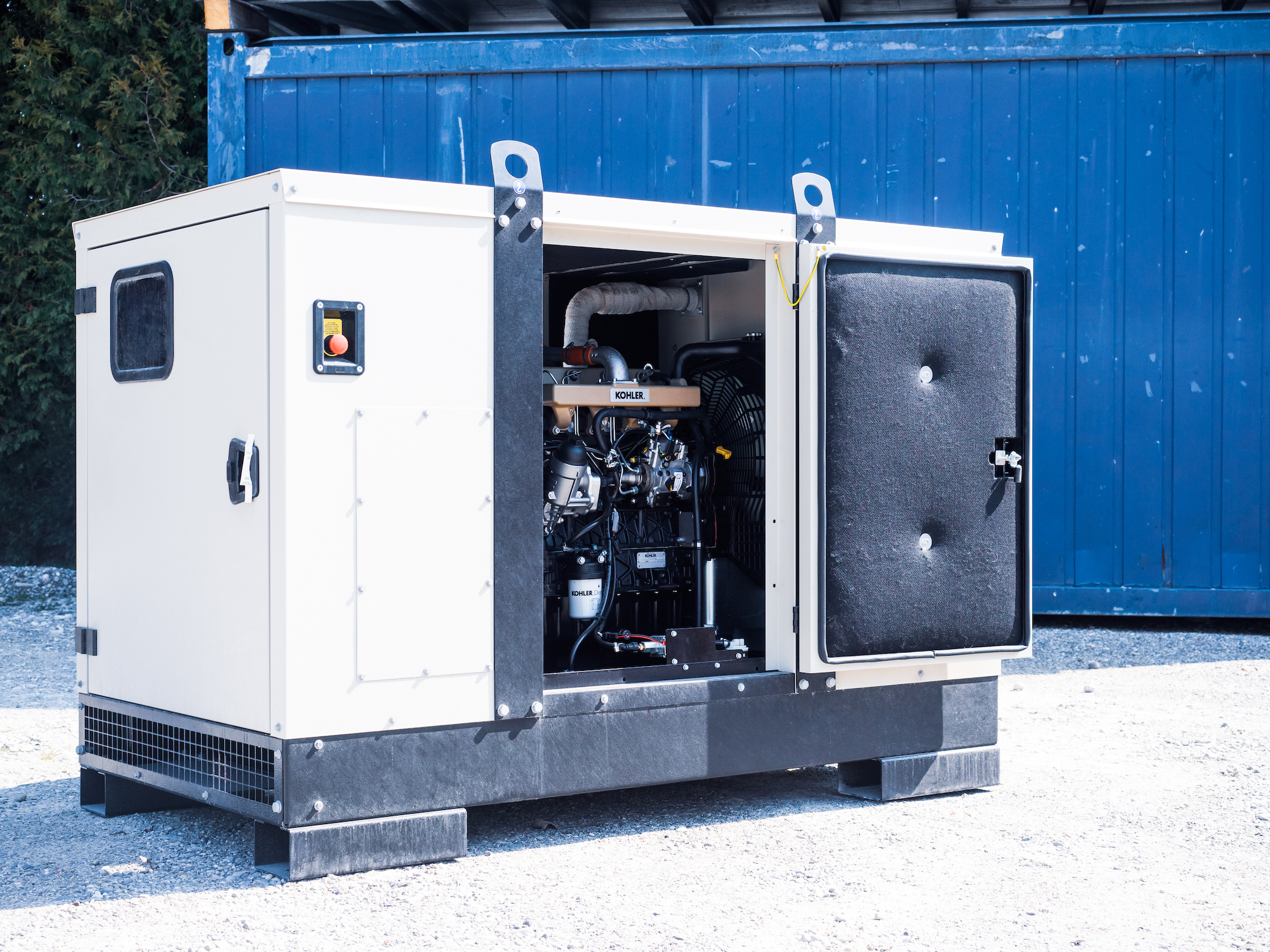 FOGO 40 kVA Notstromaggregat, angetrieben von Kohler KDI2504-TM40 Dieselmotor